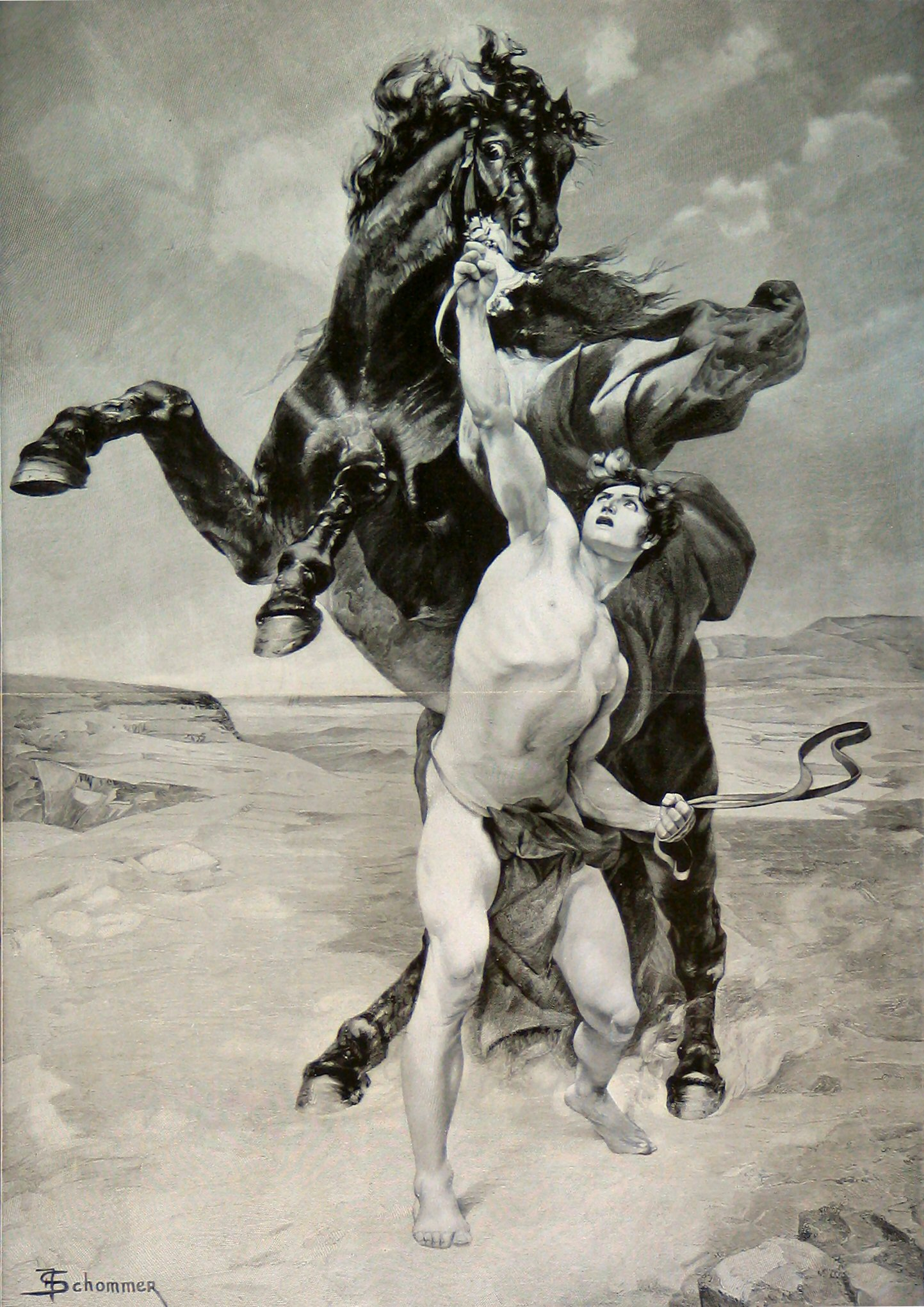 Alexander old drawings